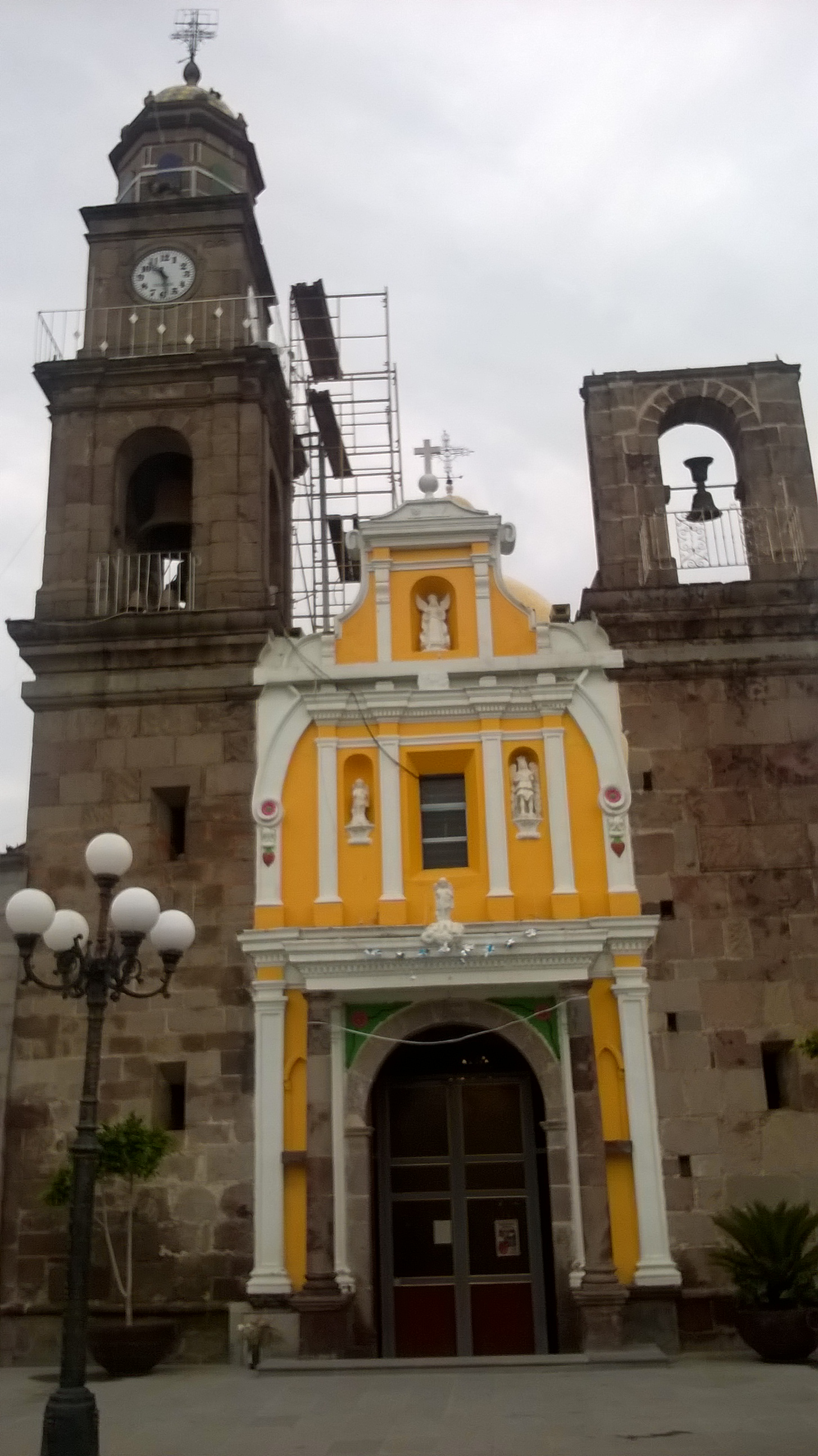 Iglesia de San Jerónimo Zacualpan, Tlaxcala